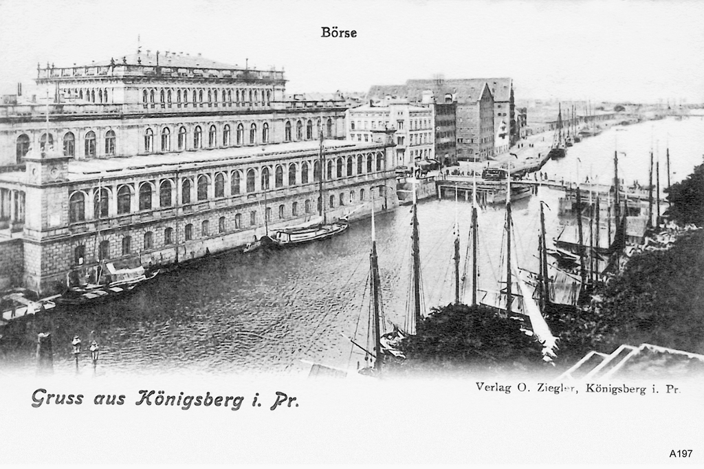 Königsberg